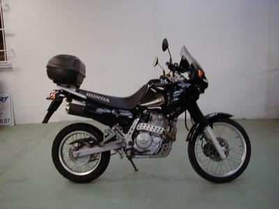 Motocyclette Marque : Honda Serie : NX Cylindré : 650cc Appellation courante : Dominator Auteur de la photographie : Aurélien Haberstich (moi-même)